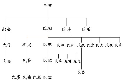 後北條氏在戰國時代的家系。